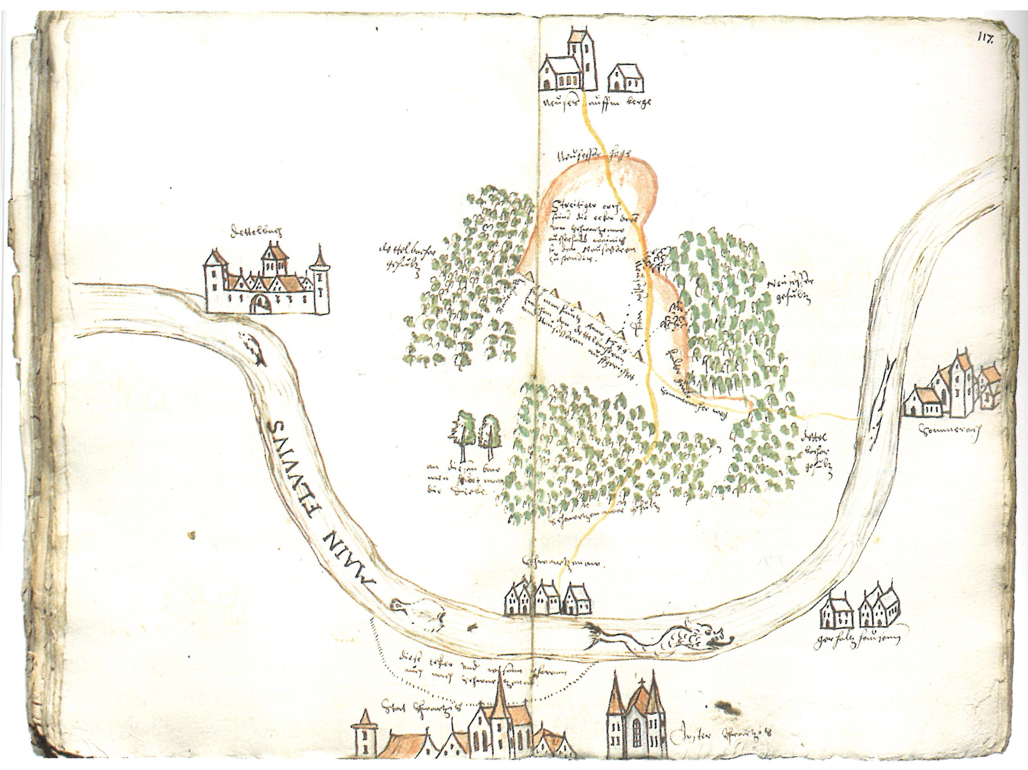 Karte über Gemarkungsstreitigkeiten zwischen Schwarzenau und den Nachbarorten am Maindreieck in Unterfranken. U. a.: Dettelbach, Neuses am Berg, Sommerach, Stadtschwarzach, Münster-Schwarzach, Schwarzenau unten im Mittelpunkt. LATH, StAM, Hennebergica Gotha 654 Bl. 116 v 117 r